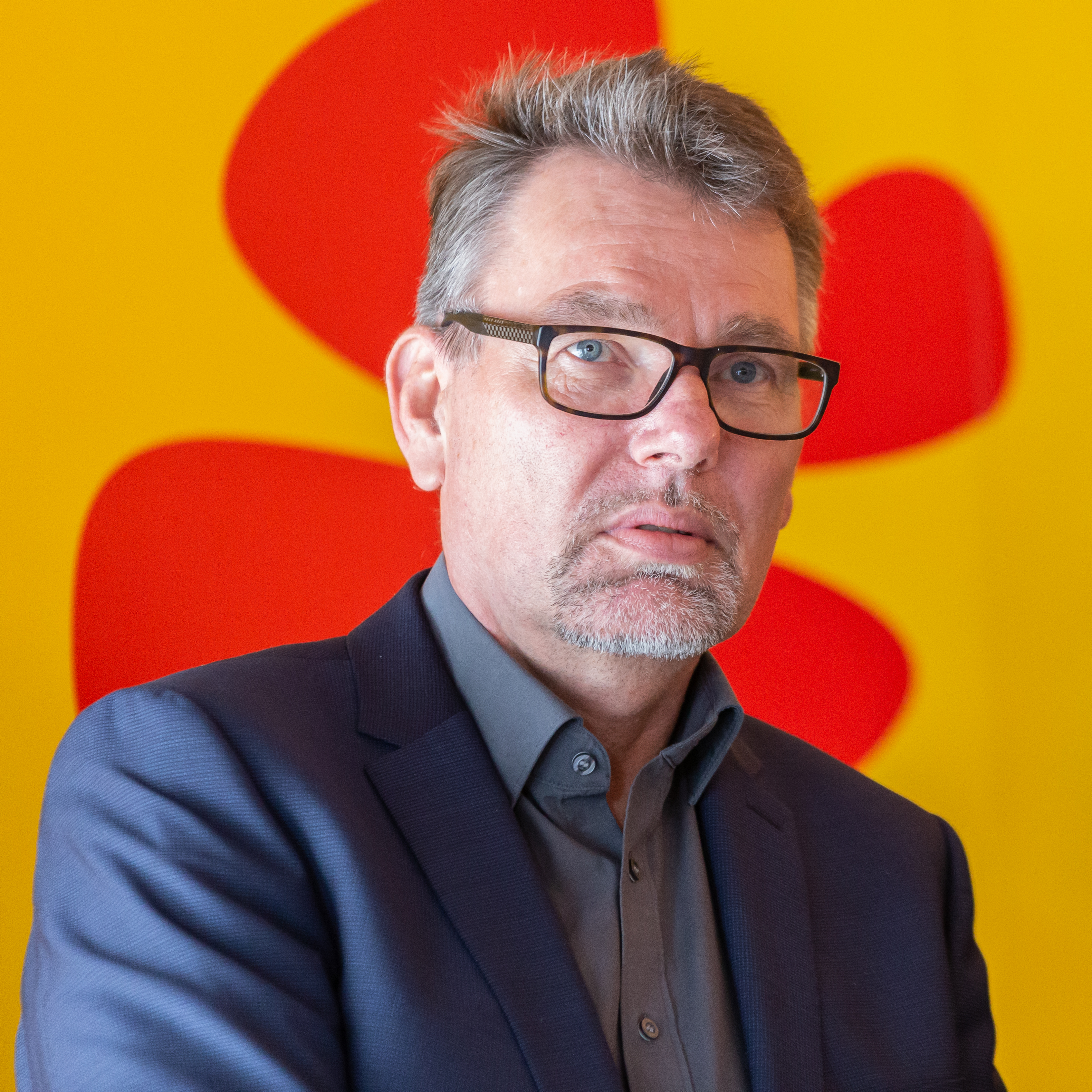 Pressekonferenz zur Vorbereitung des Biathlon-Weltcups und der Umbenennung der Ski-Arena; Hartmut Schubert (Staatssekretär im Thüringer Ministerium für Soziales, Familie und Gesundheit); Porträt, Einzelbild